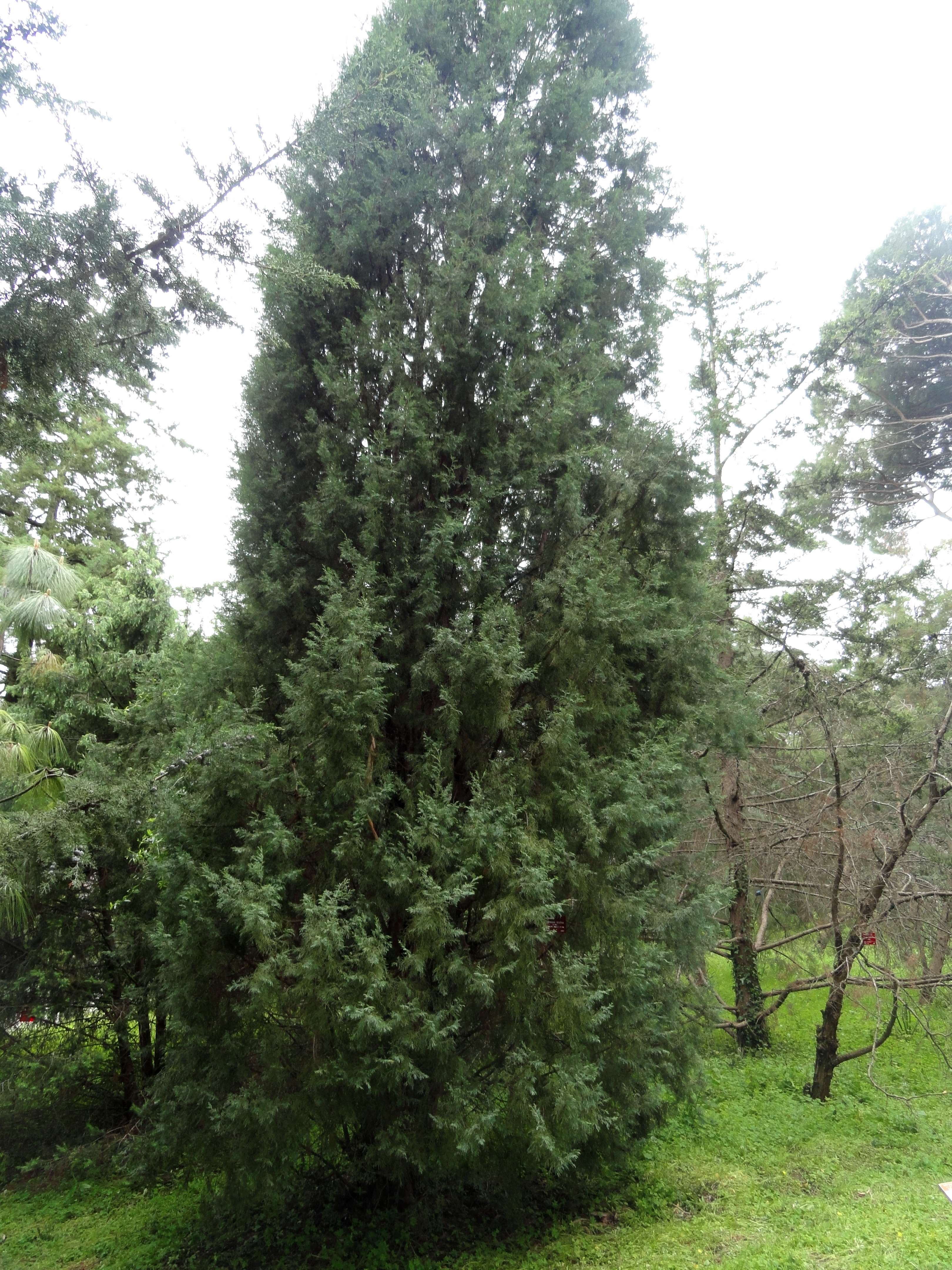 Cupressus torulosa specimen in the Jardin botanique de la Villa Thuret, Antibes Juan-les-Pins, Alpes-Maritimes,France.